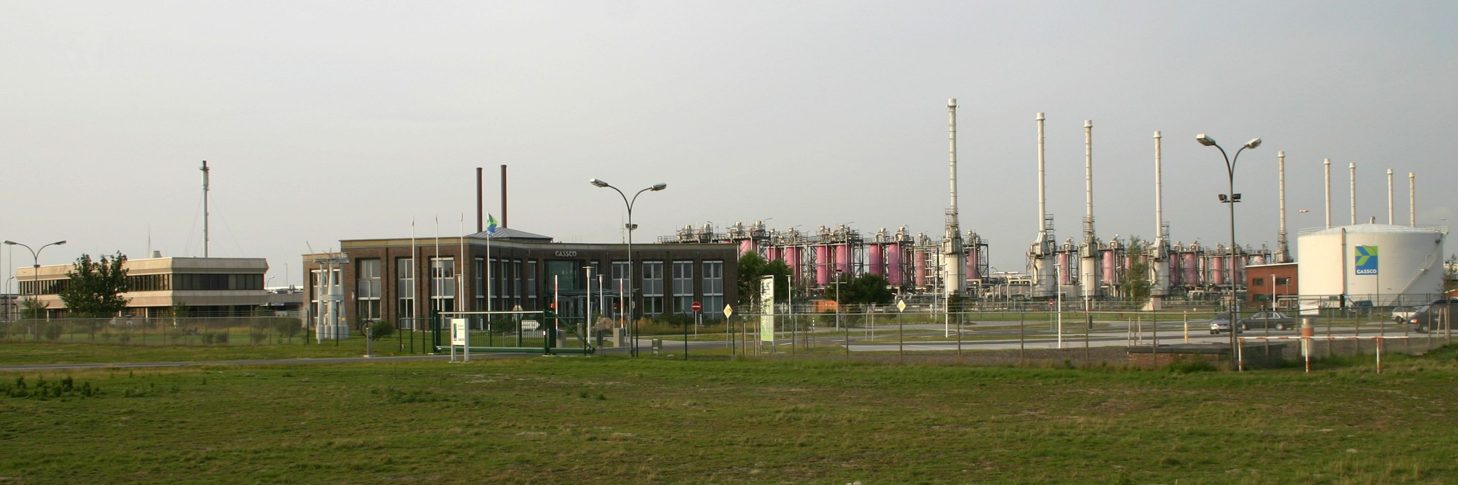 Norsea Gas Terminal (NGT) – Gasanlandestation an der Knock in Emden. Sie empfängt norwegisches Nordseegas und damit einen wesentlichen Teil des deutschen Erdgasimports.